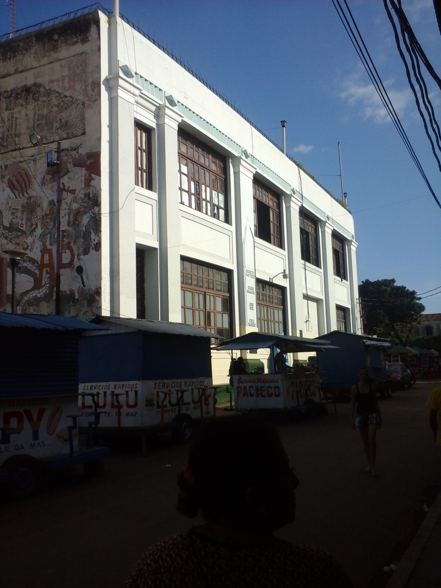 Barrio El Sagrario, León, Nicaragua